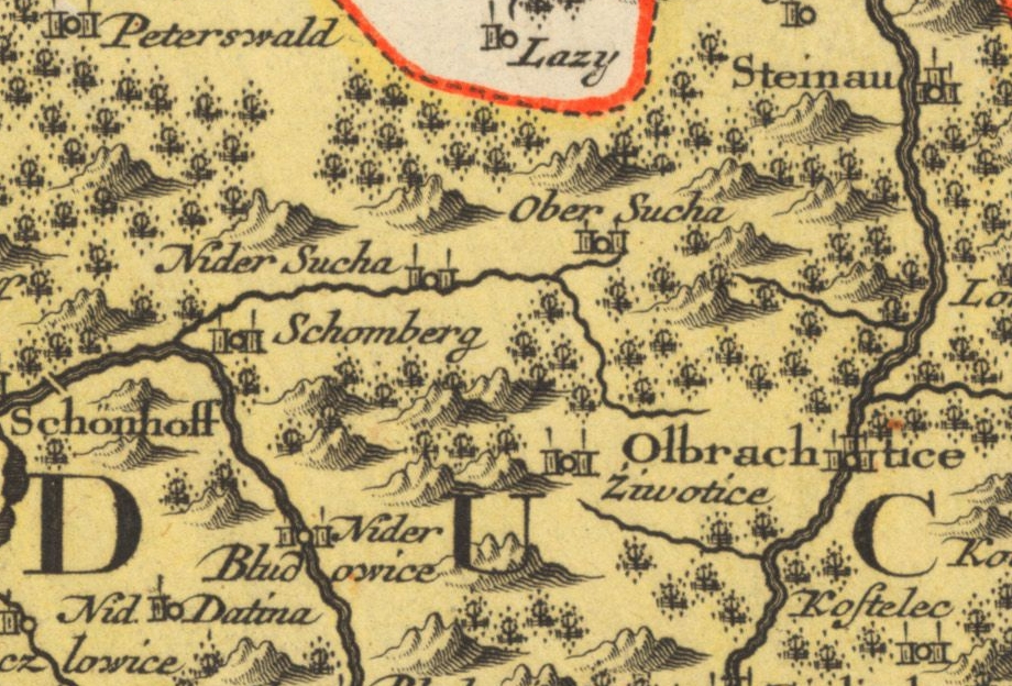 Horní Suchá a její blízké okolí na mapě Těšínského knížectví z přelomu 17. a 18. století. Autorem mapy je Matthäus Seutter.